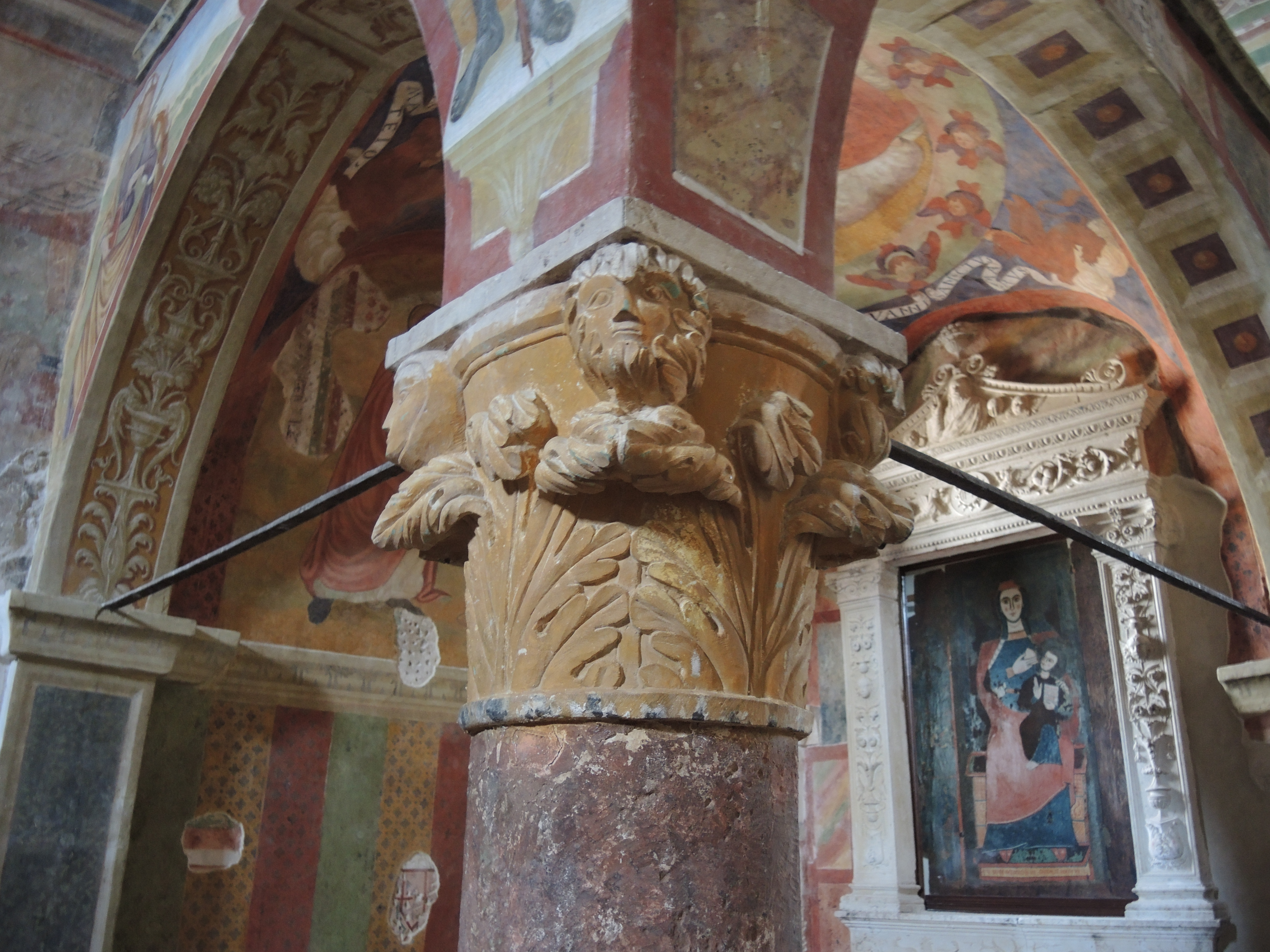 Fossa (L'Aquila): Chiesa di Santa Maria ad Cryptas